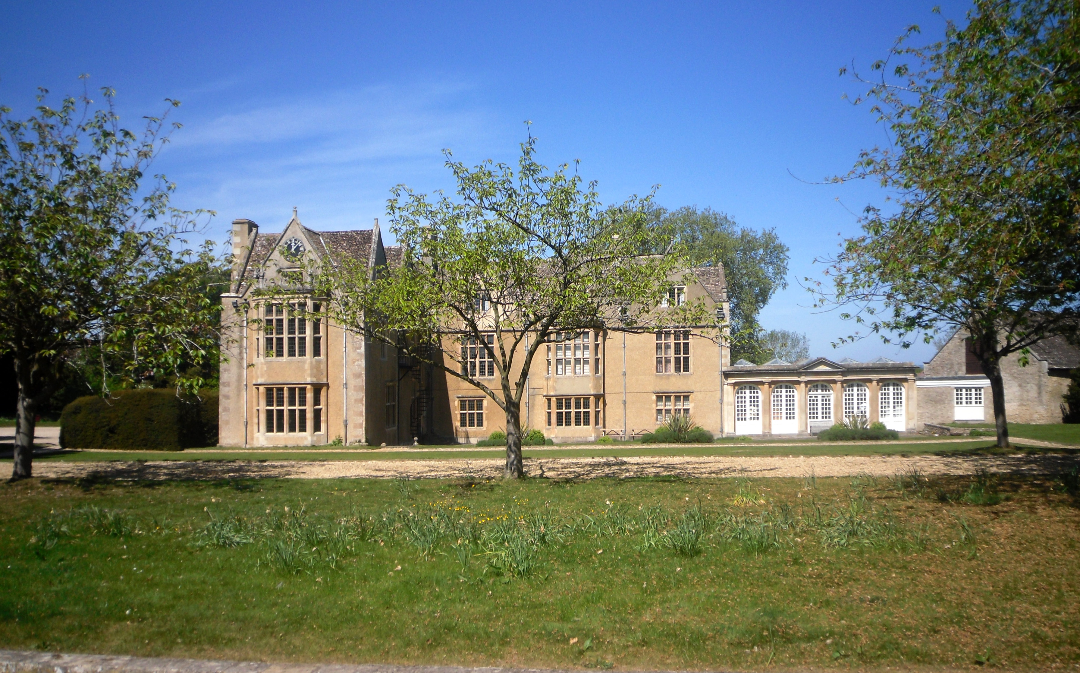 A Cotswold stone manor house dating in part from early 17C, it was restored in Victorian times by William Niven, the father of film actor David Niven. Now home to St. Hugh's School which has been there since WW2 following evacuation.